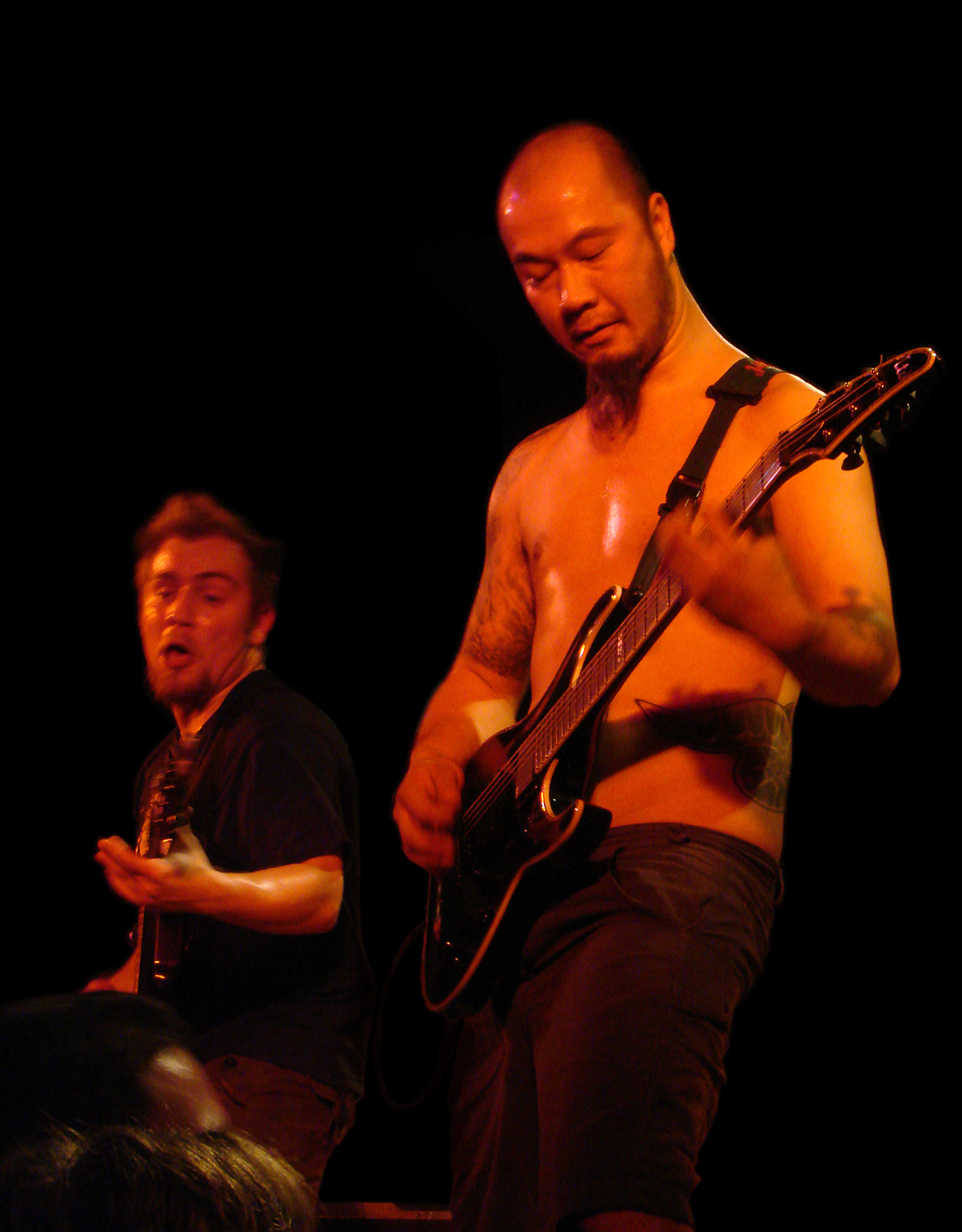 Benighted au Coolness'tival 2007, le 3/11/07 à Montdidier (80).Aux guitares: Olivier et Liem (1er plan).